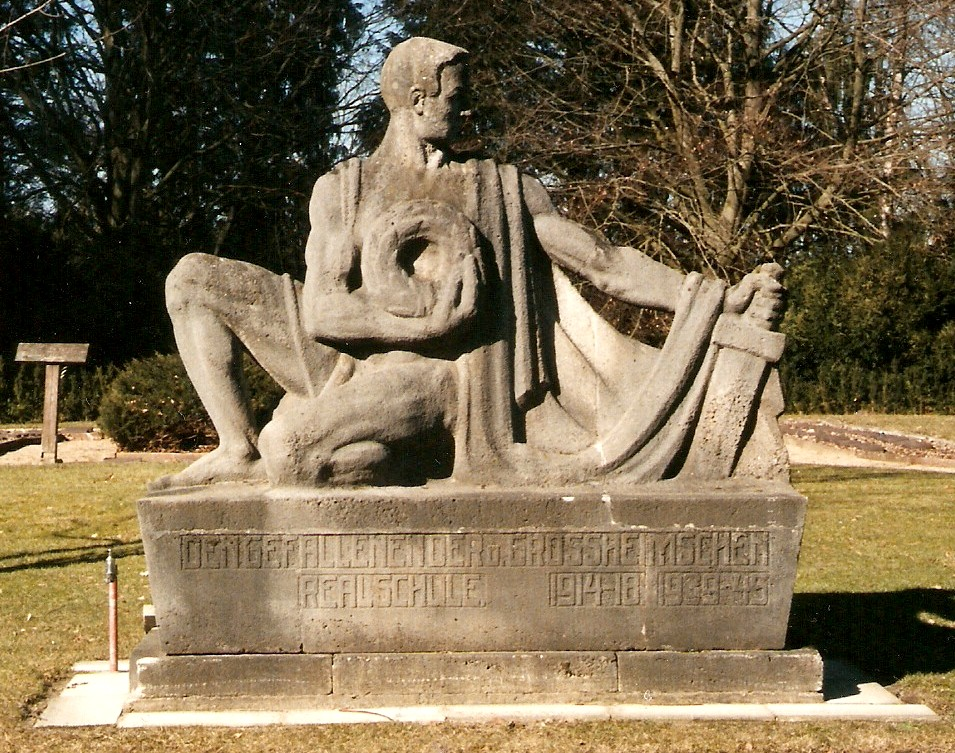 Den Gefallenen der Groszheimschen Realschule